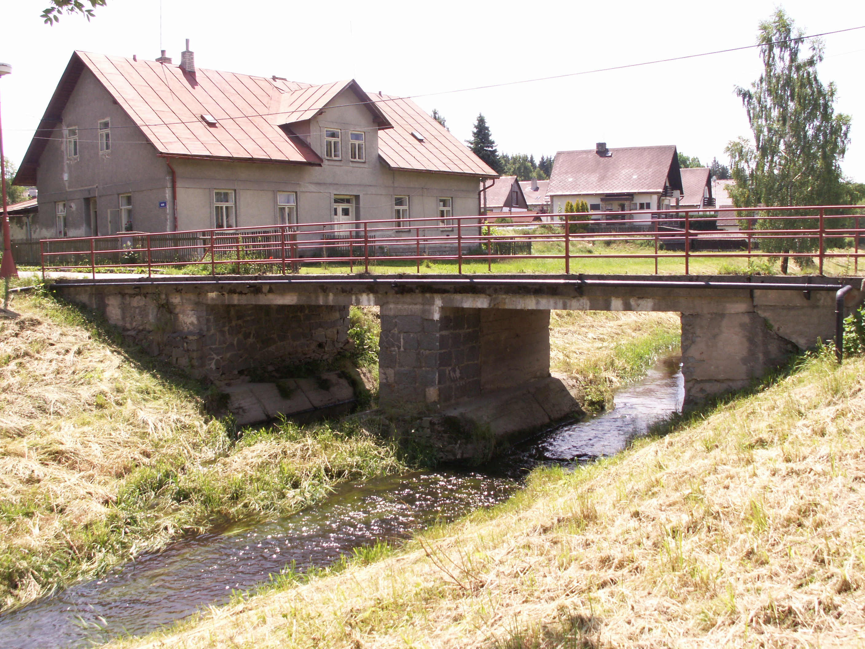 Svratka - most přes řeku Svratku